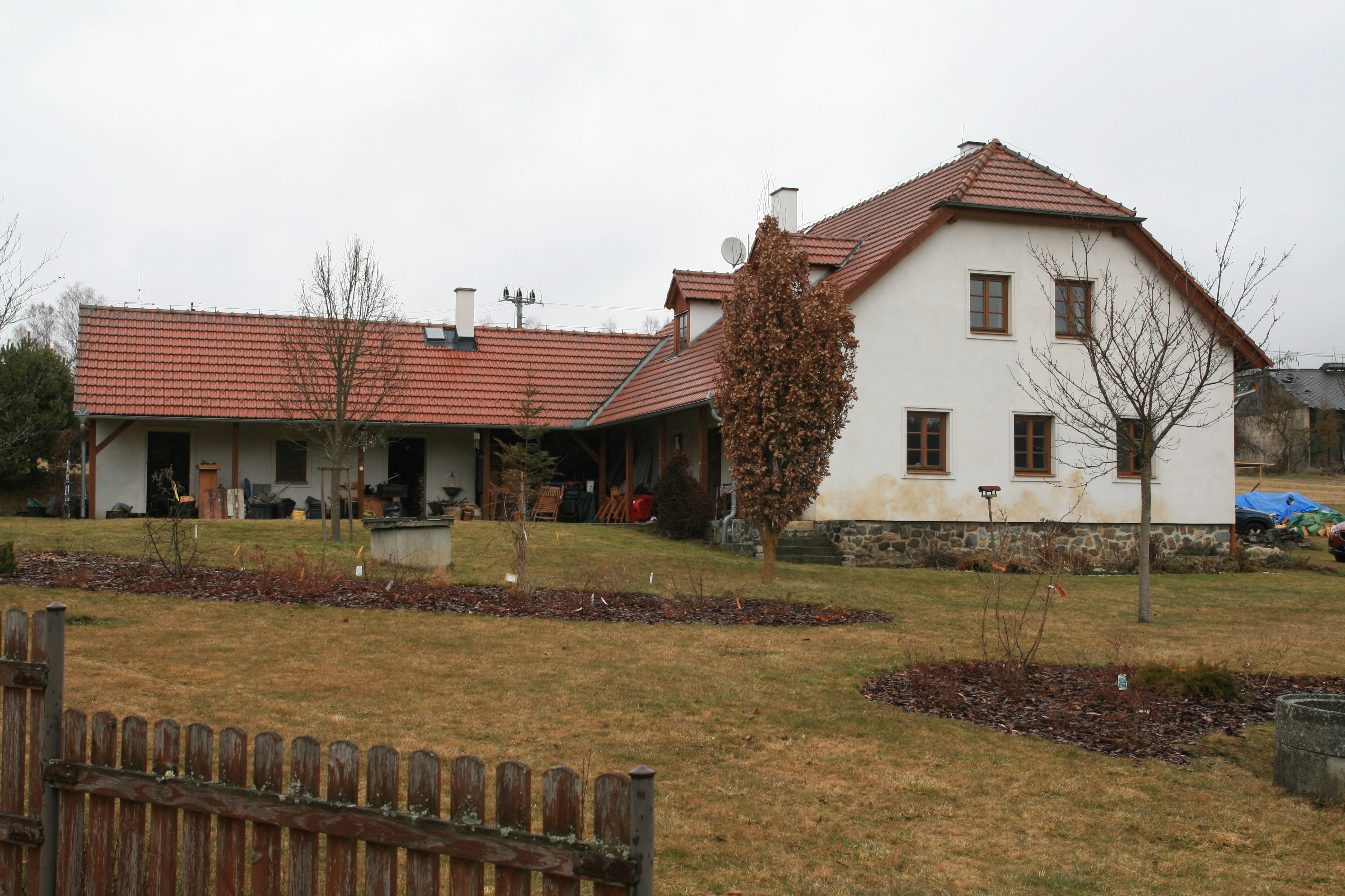 Vesnice Slubice, část obce Bohdalovice v okrese Český Krumlov. Dům na západním okraji vsi - pohled od silnice.